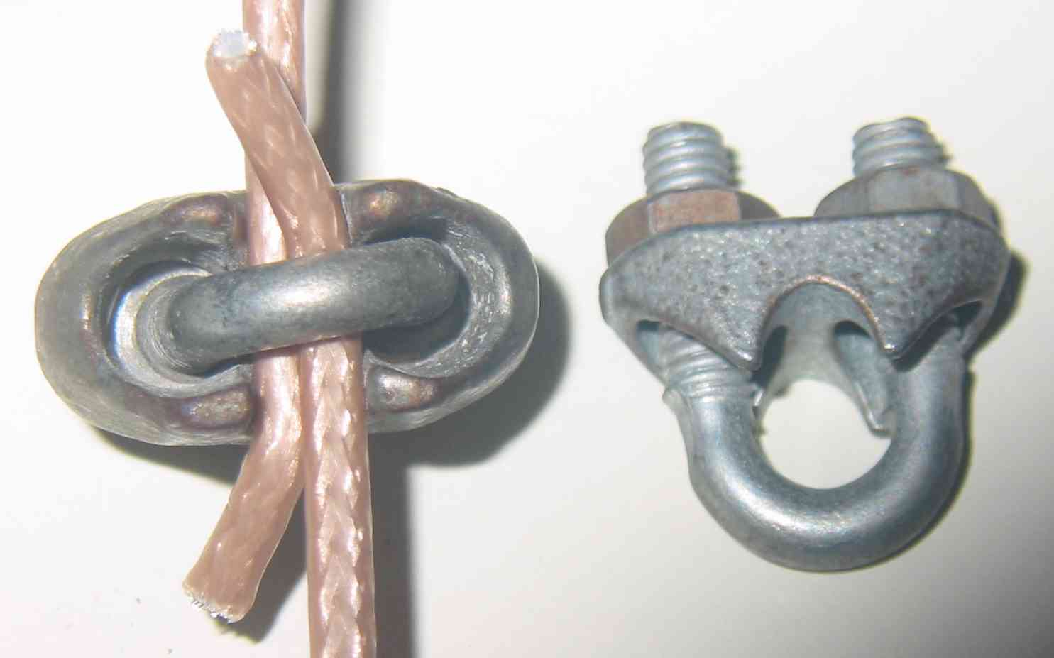 Seilklemme